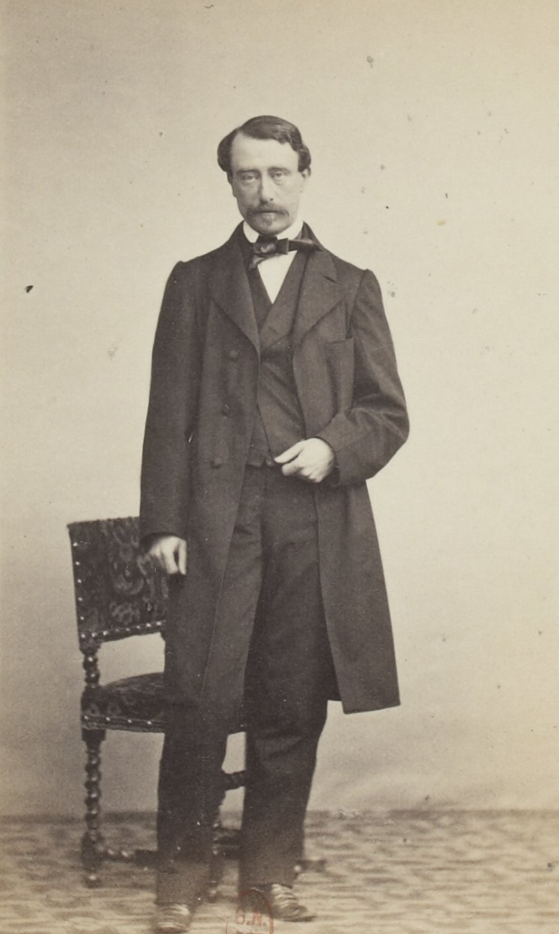 Album des députés au Corps législatif entre 1852-1857.